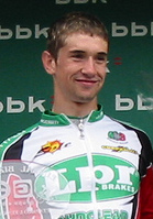 Aitor Hernandez, Euskal Bizikleta 2005